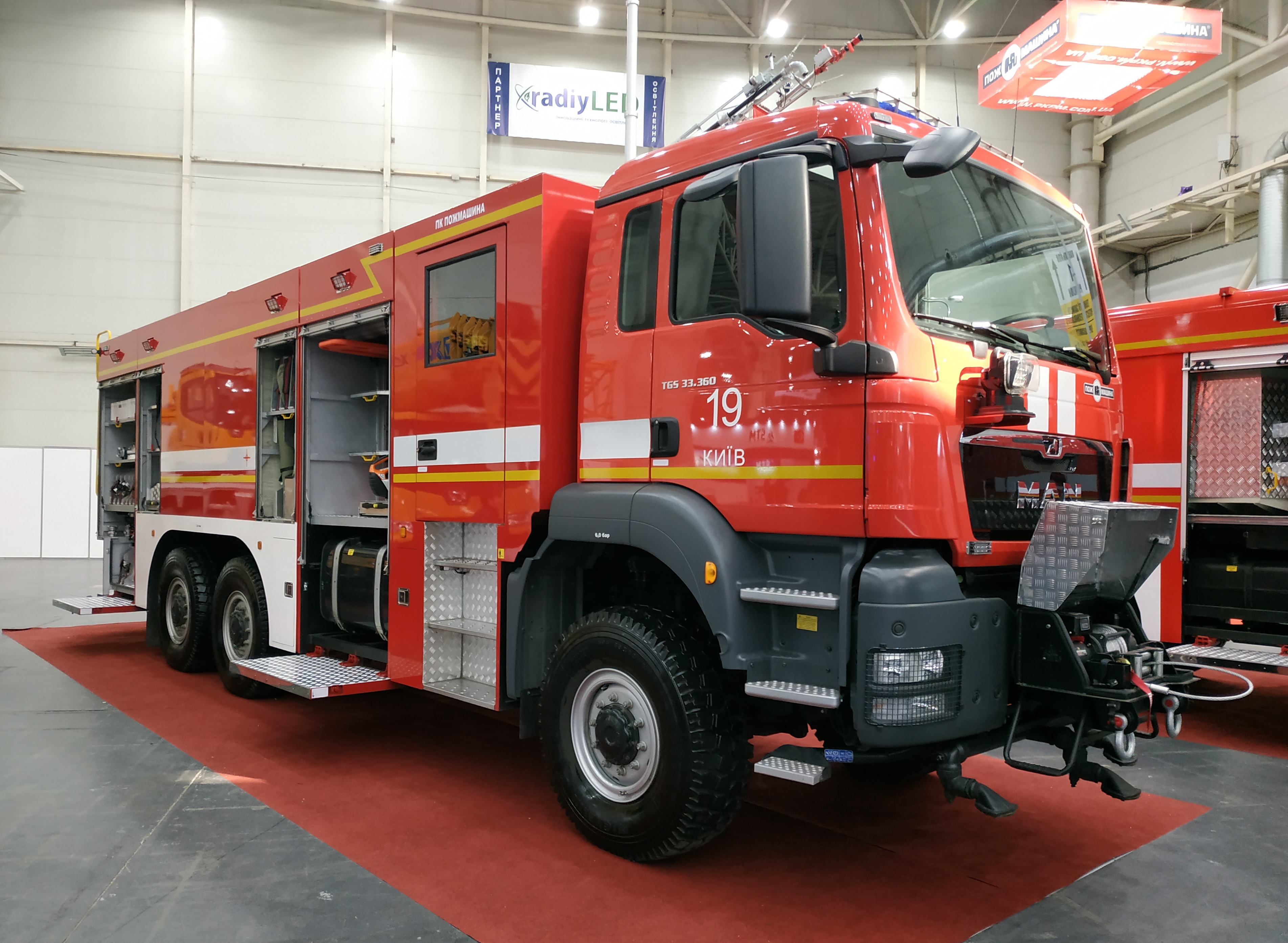 Автоцистерна пожарная АЦ-8-60 (TGS 33.360)-526M на шасси MAN TGS 33.360 6x6 в экспозиции завода "Пожмашина". Выставка "Зброя та безпека", Киев, октябрь 2019 г.